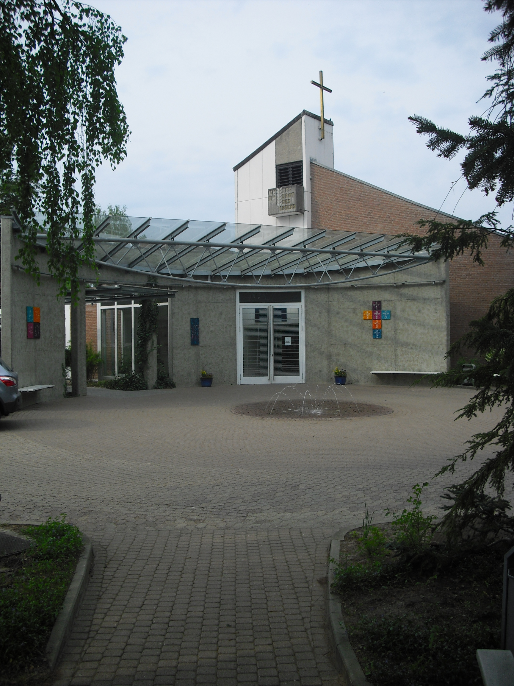 Evangelisch-lutherische Kirche im Geistlichen Rüstzentrum Walsrode-Krelingen